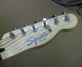 Squier Telecoustic DSC03904